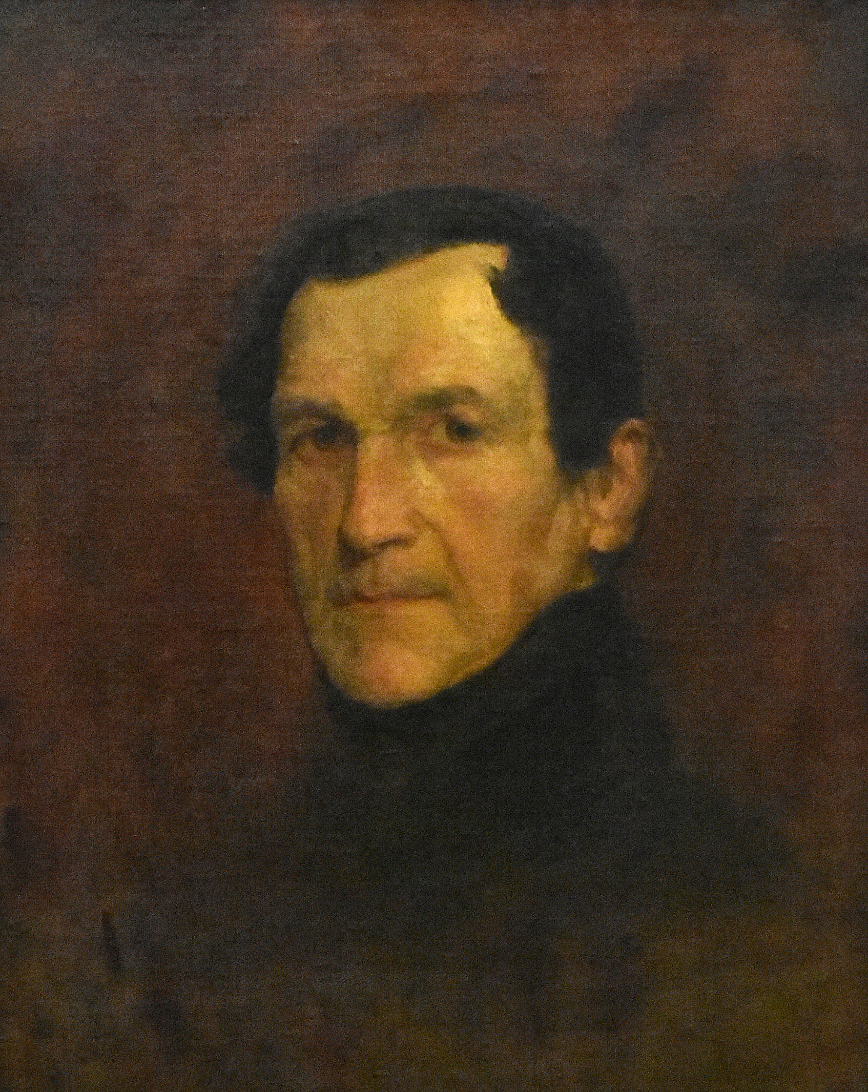 Liéven de Winne (1821-1880) Portret van Koning Leopold I KMSKB 29-01-2019